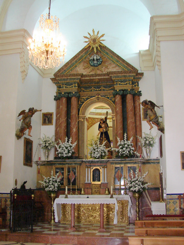 Interior de la ermita del Calvario. Montalbán de Córdoba.